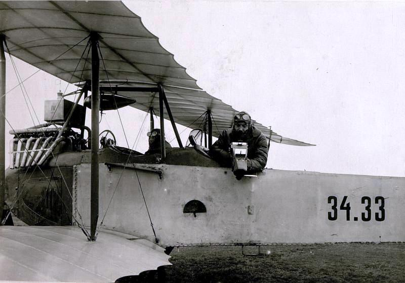 Fotografieren aus dem Flugzeug, Kolomea